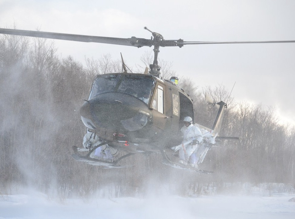 冬戦教にて、UH-1からの展開を準備する隊員。